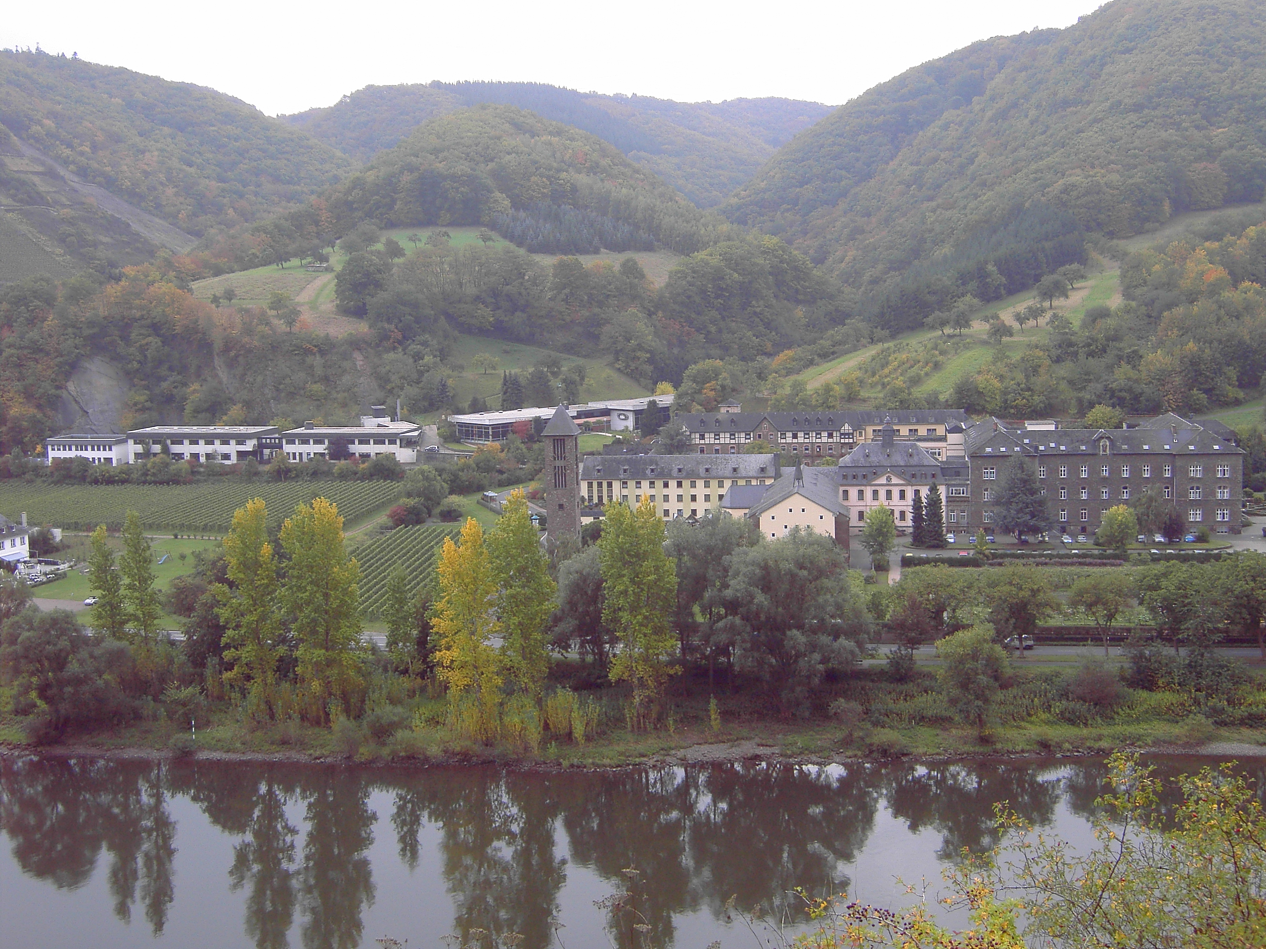 Blick auf Kloster Ebernach von der anderen Moselseite